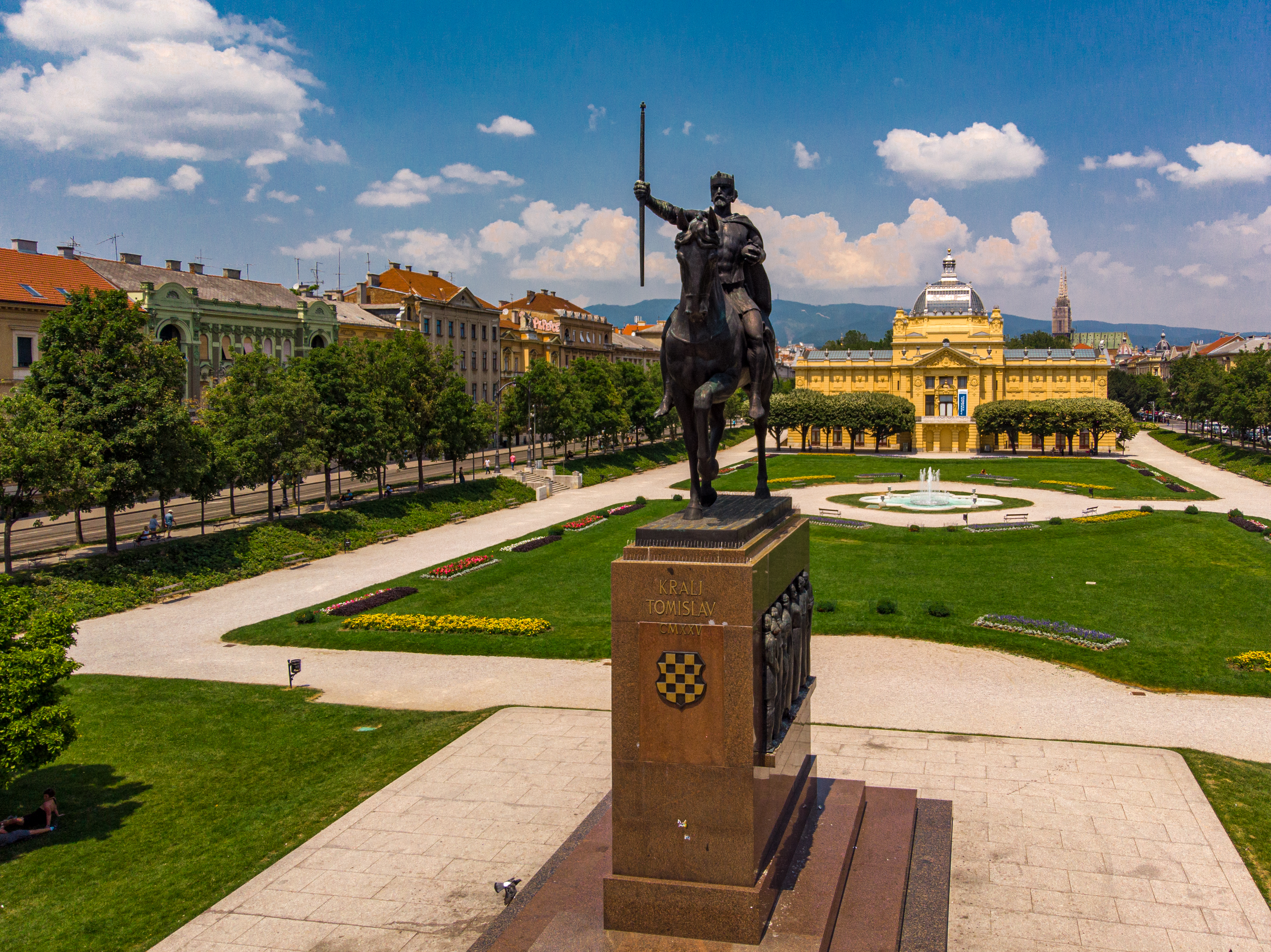 Reiterstandbild Tomislav und Kunstpavillon Zagreb